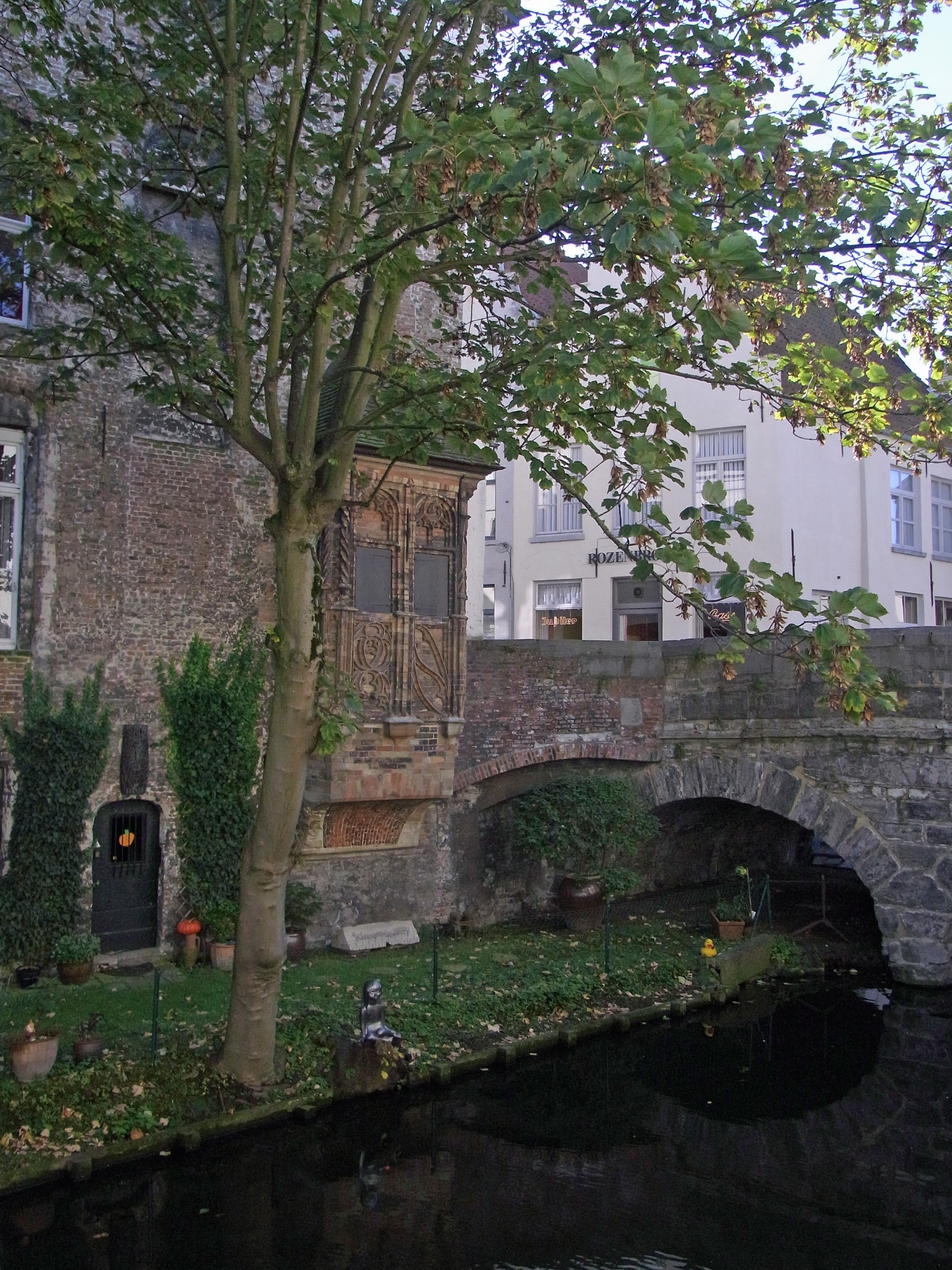 Brügge: Vlamingstraat 100